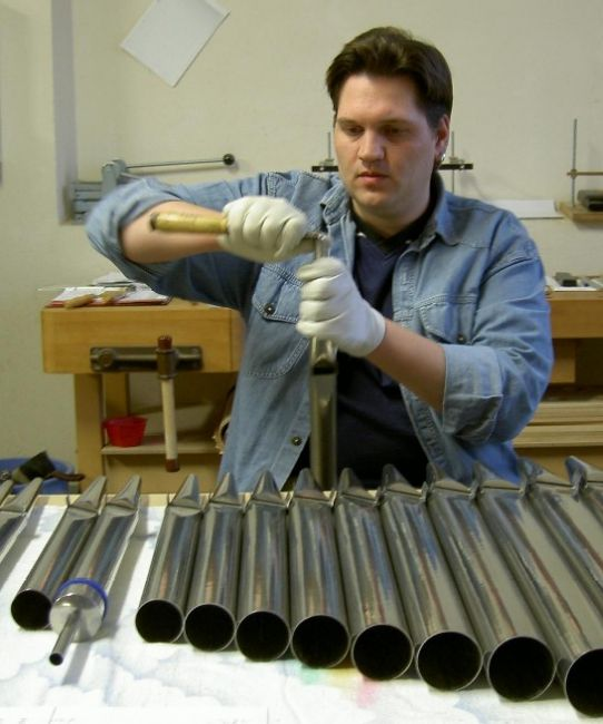 Orgelbauer Karten Hörl aus Helmbrechts